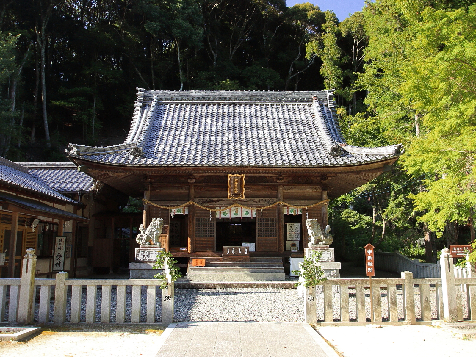 松平東照宮本殿（豊田市松平町、2009年）